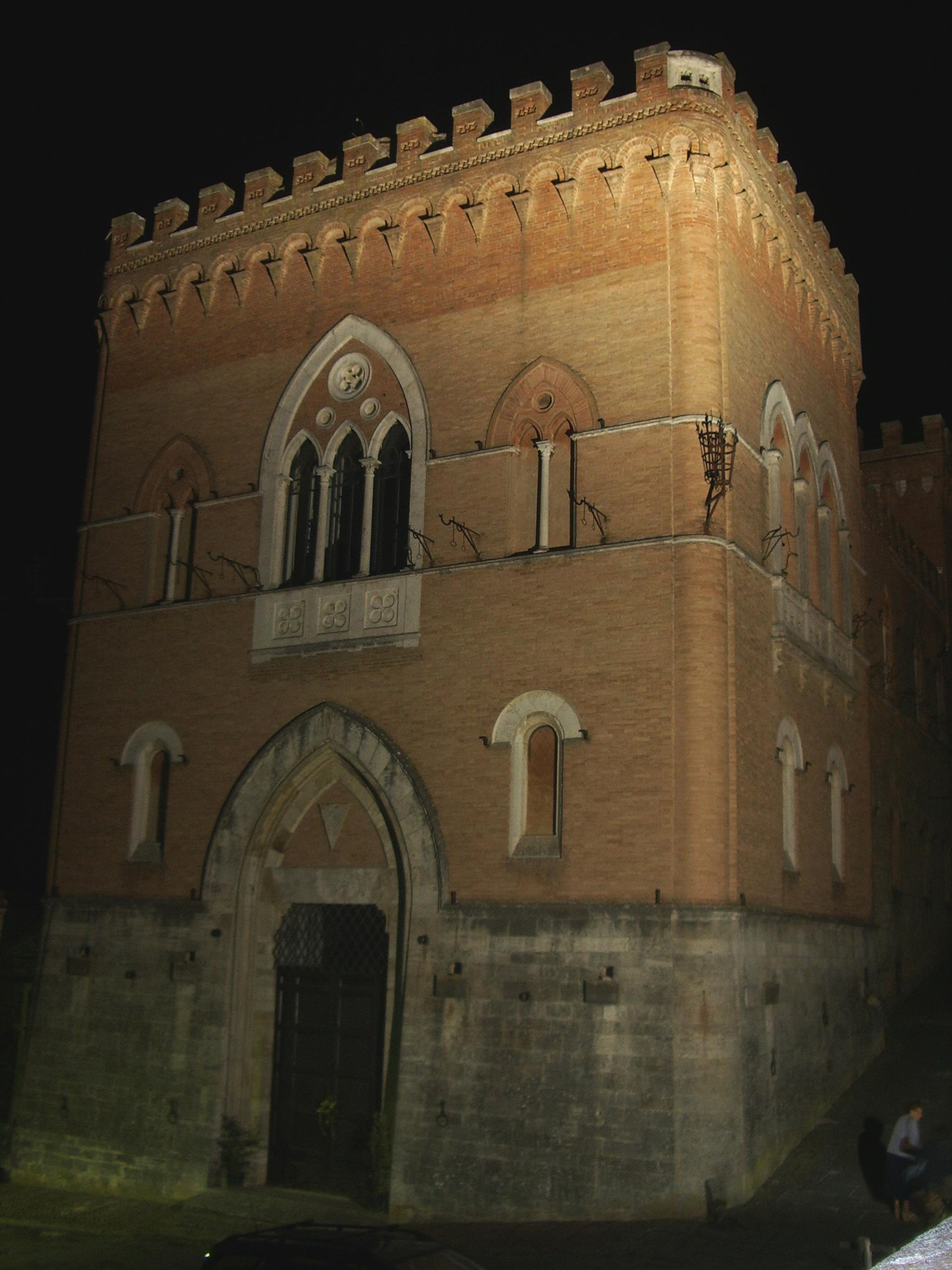 Esterno Notturno Castello di Farnetella (Siena)